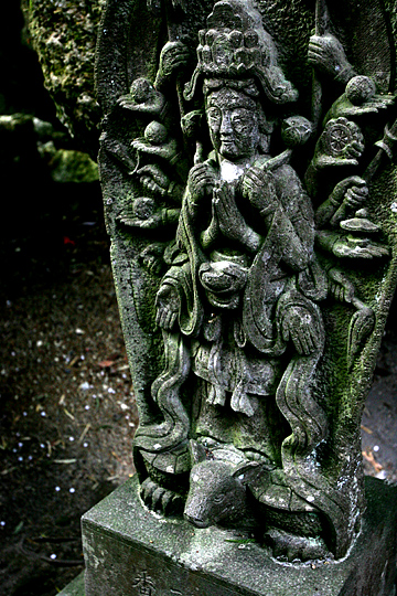 ZUIGAN-JI at MATSUSHIMA.